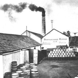 Destilaciones Bordas en Sevilla